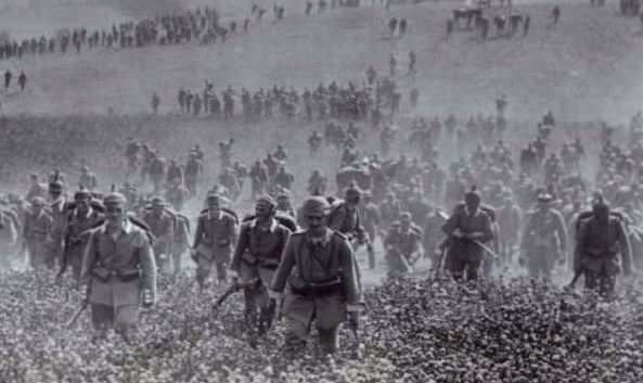 Truppe tedesche in avanzata nell'agosto 1914 durante l'invasione del Belgio e della Francia settentrionale